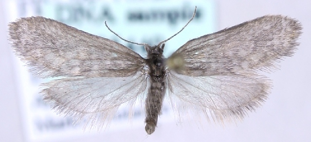 Dahlica lazuri